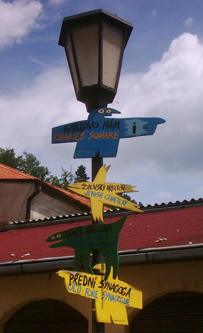 Originální ukazatel cesty v Židovském ghettu v Třebíči.